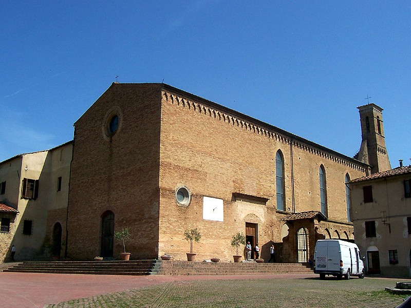 San Gimignano - Chiesa di S. Agostino